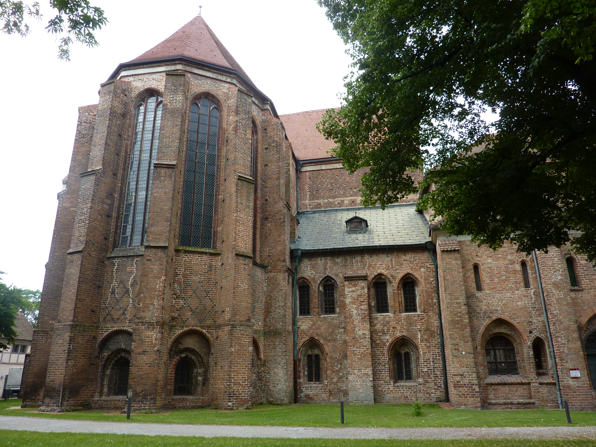 Dom St. Peter und Paul in Brandenburg an der Havel